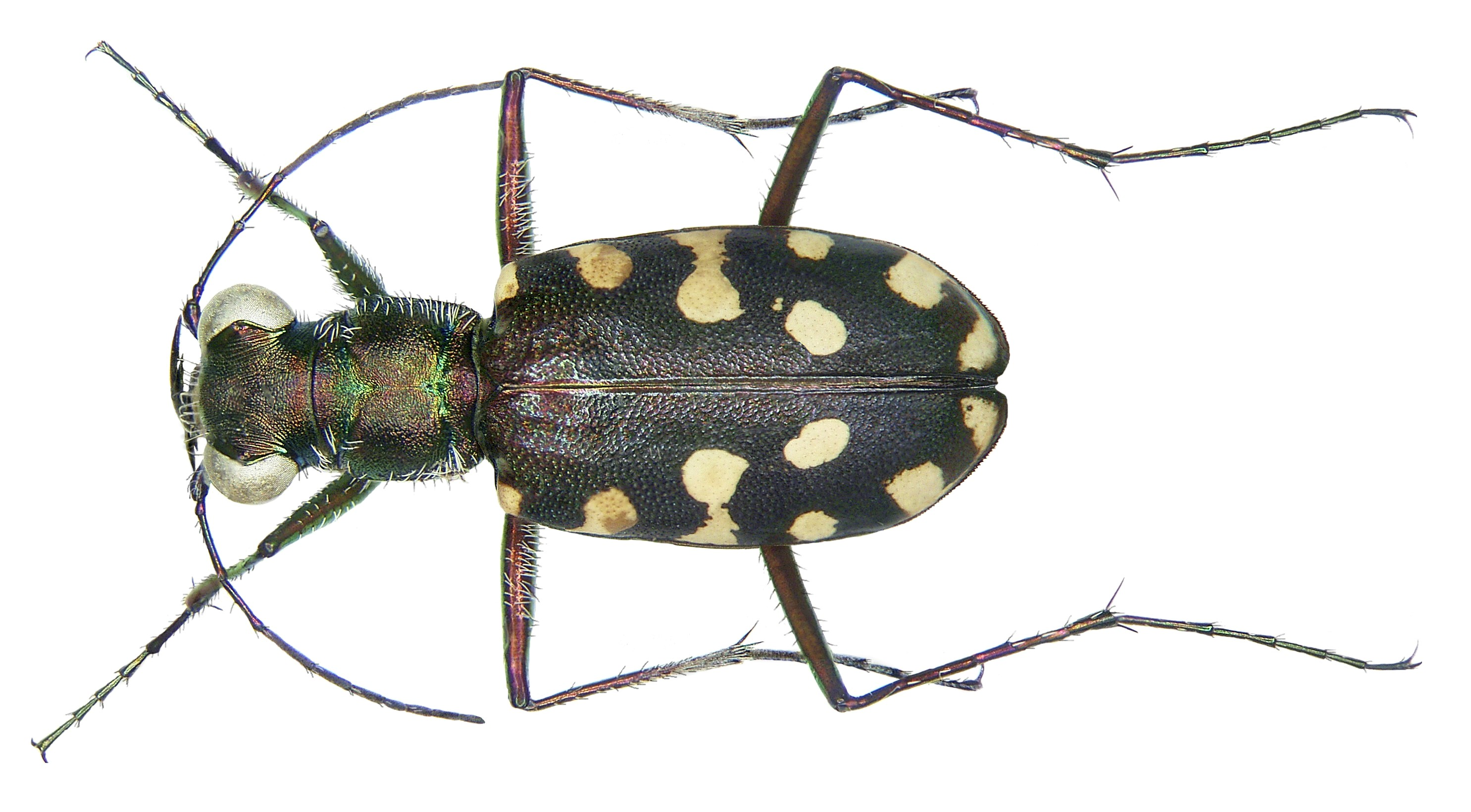 Familie: Carabidae Grösse: 12 mm Fundort: Senegal, M`Bour leg. U.Schmidt, 1992; det. J.Gebert, 2007 Foto: U.Schmidt, 2008